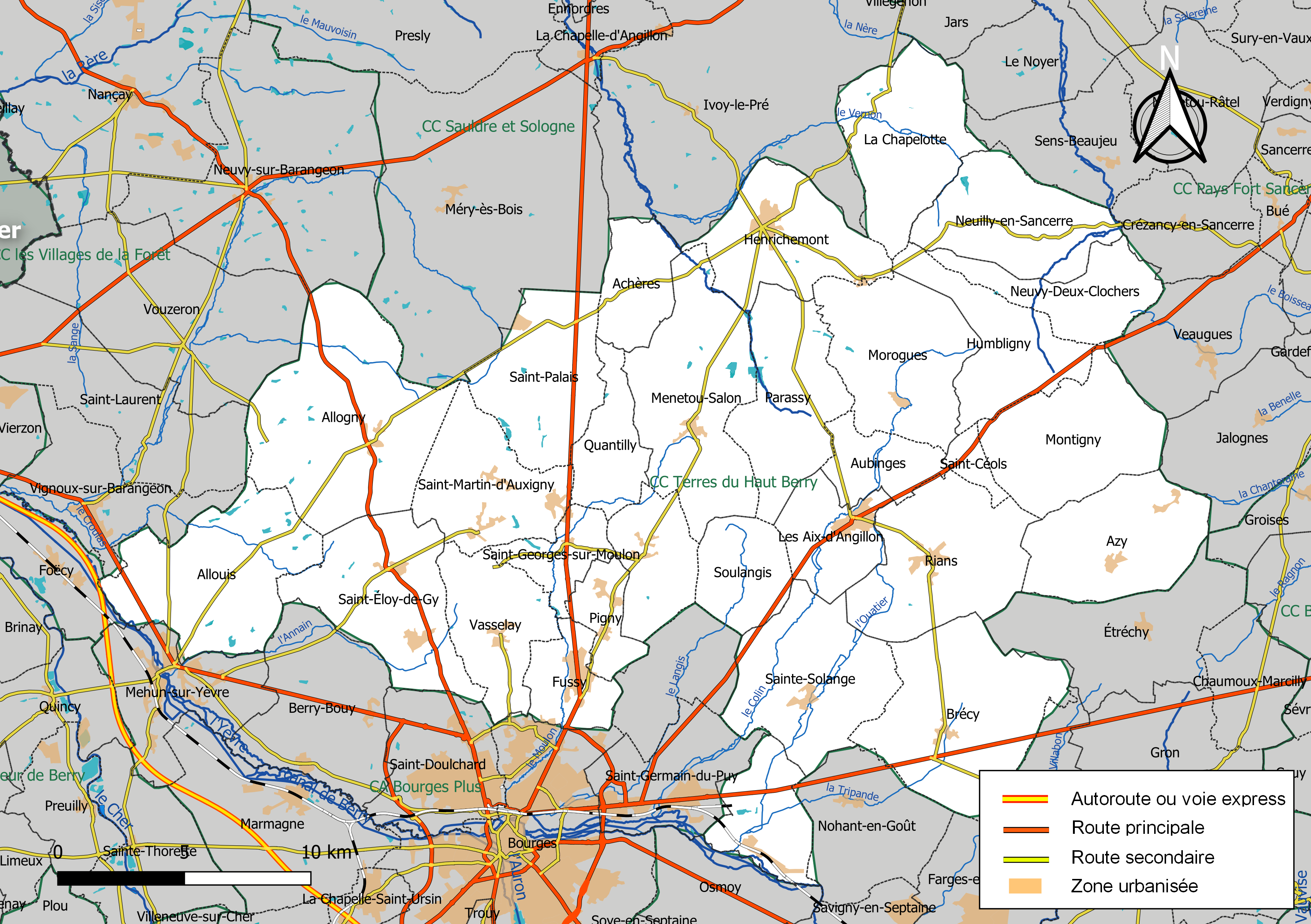 Carte géographique de la communauté de communes Terres du Haut Berry, département du Cher, France. Composition au 1er janvier 2019.